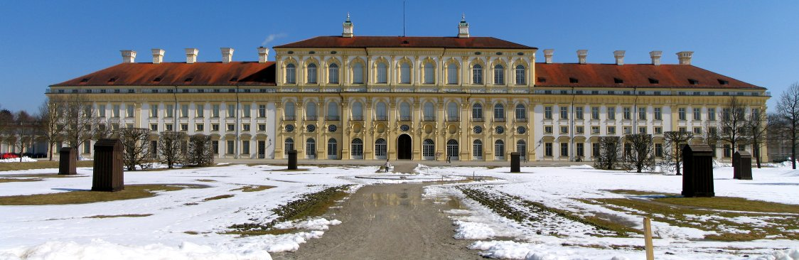 Schloss Schleissheim West/ Castle Schleissheim West - panoramic picture Author: Patrick Huebgen Date: March 2006 Camera: Canon Powershot S1